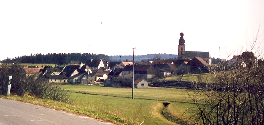 Autenhausen_im_Landkreis_Coburg,_Ortsansicht_1974